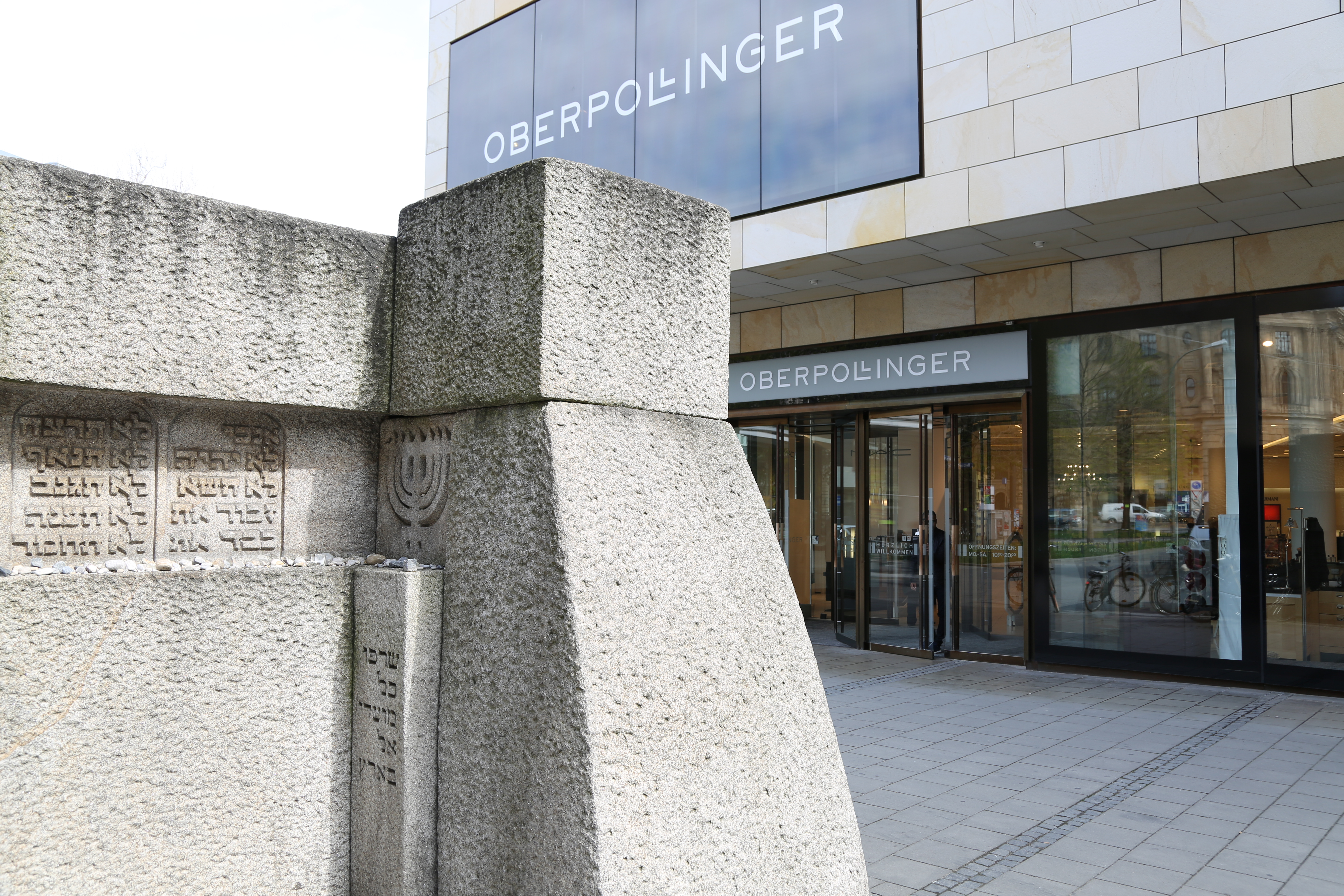 Denkmal für die alte Hauptsynagoge Münchens, abgerissen im Juni 1938. Das Grundstück wurde an Karstadt für einen Erweiterungsbau des Hauses Oberpollinger verkauft, der Erlös in den Neubau des Jüdischen Zentrums München investiert.